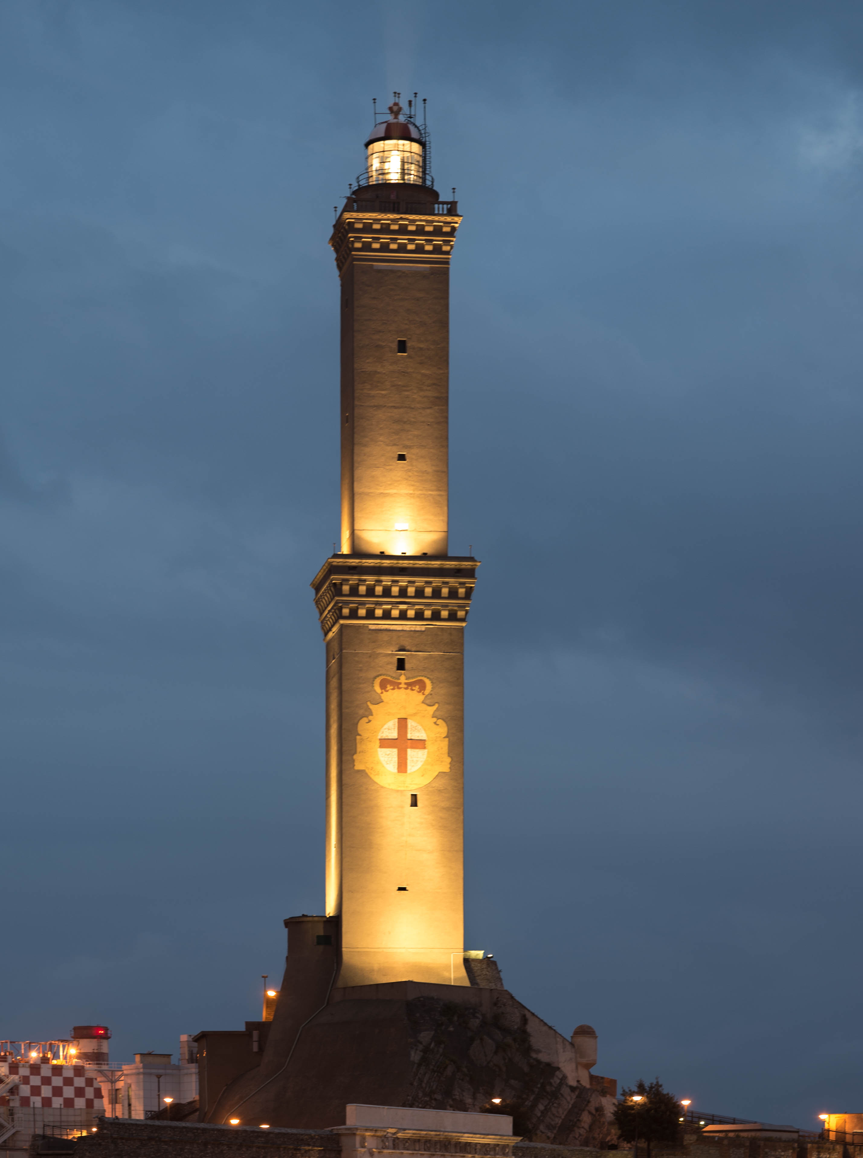 Il tramonto su Genova This is a photo of a monument which is part of cultural heritage of Italy.